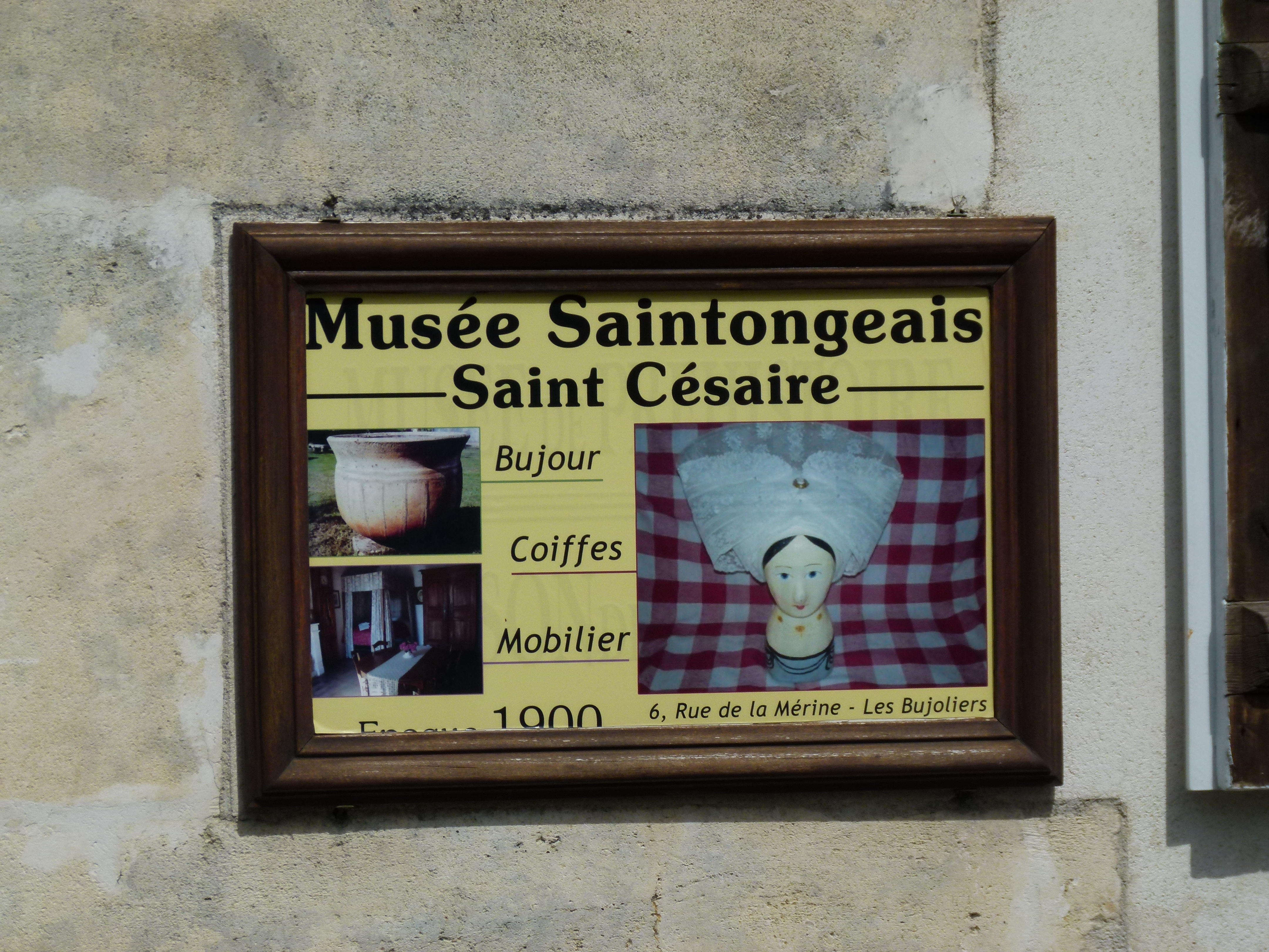 L'enseigne du Musée des Bujoliers est incrustée dans le mur de ce musée rural situé dans la commune de Saint-Césaire en Charente-Maritime, près de Saintes.